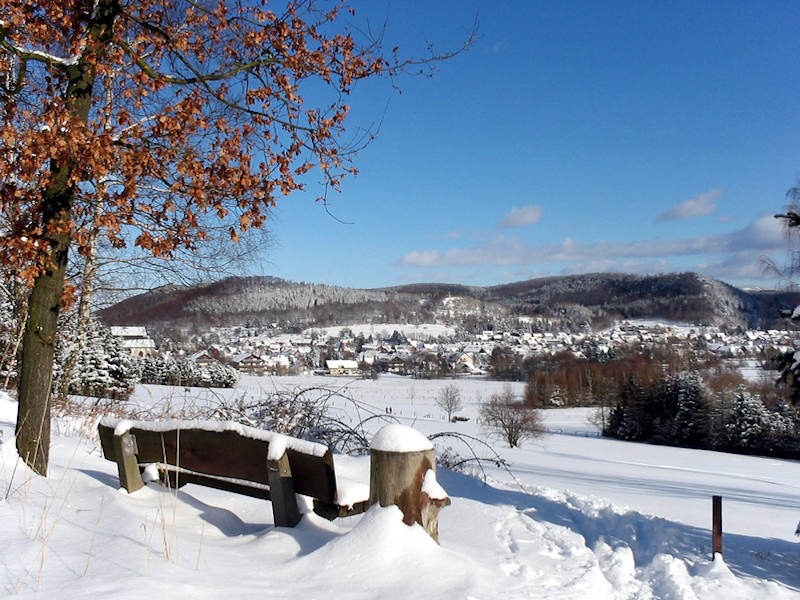 Wolfshagen im Harz, Blick auf das Dorf im Winter